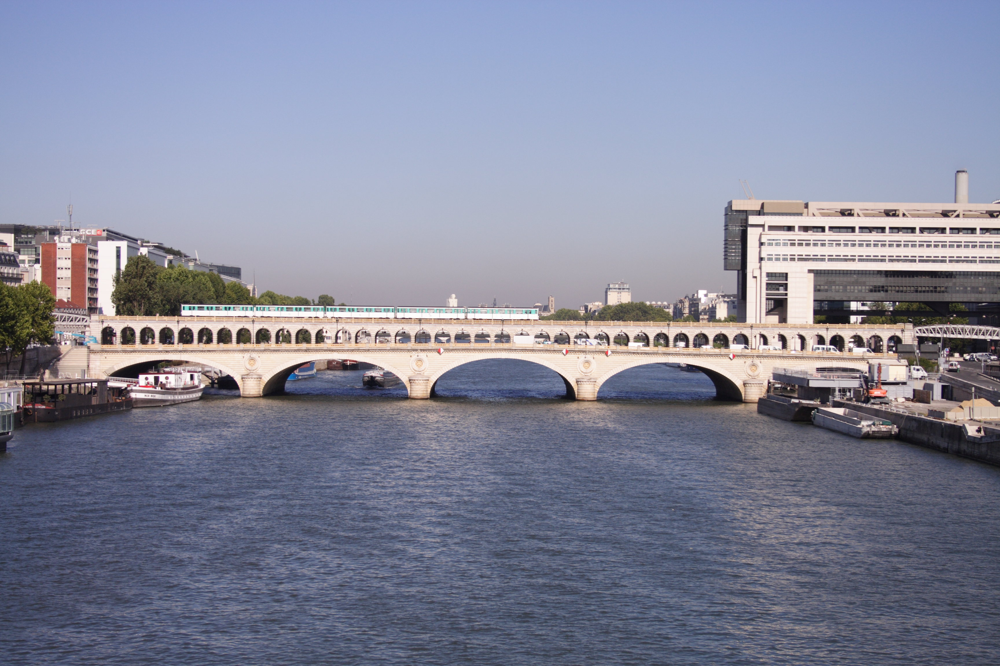 Pont de Bercy(Paris, France)